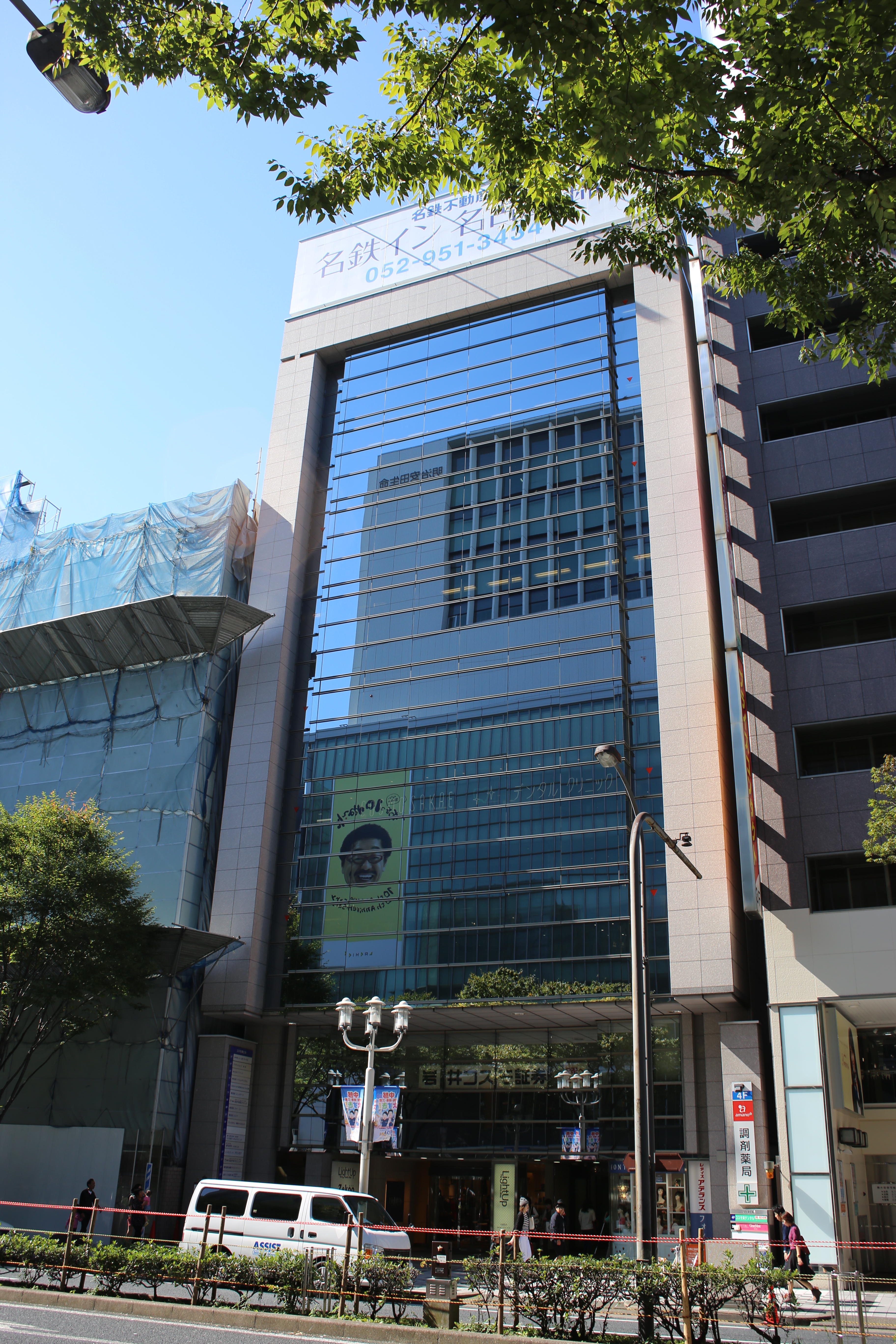 名古屋市中区栄三丁目のコスモ栄ビルを東側公道北側より撮影